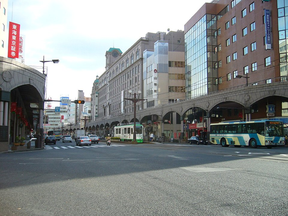 金生通り 右手前の電停は鹿児島市電朝日通り電停（鹿児島駅前方面）